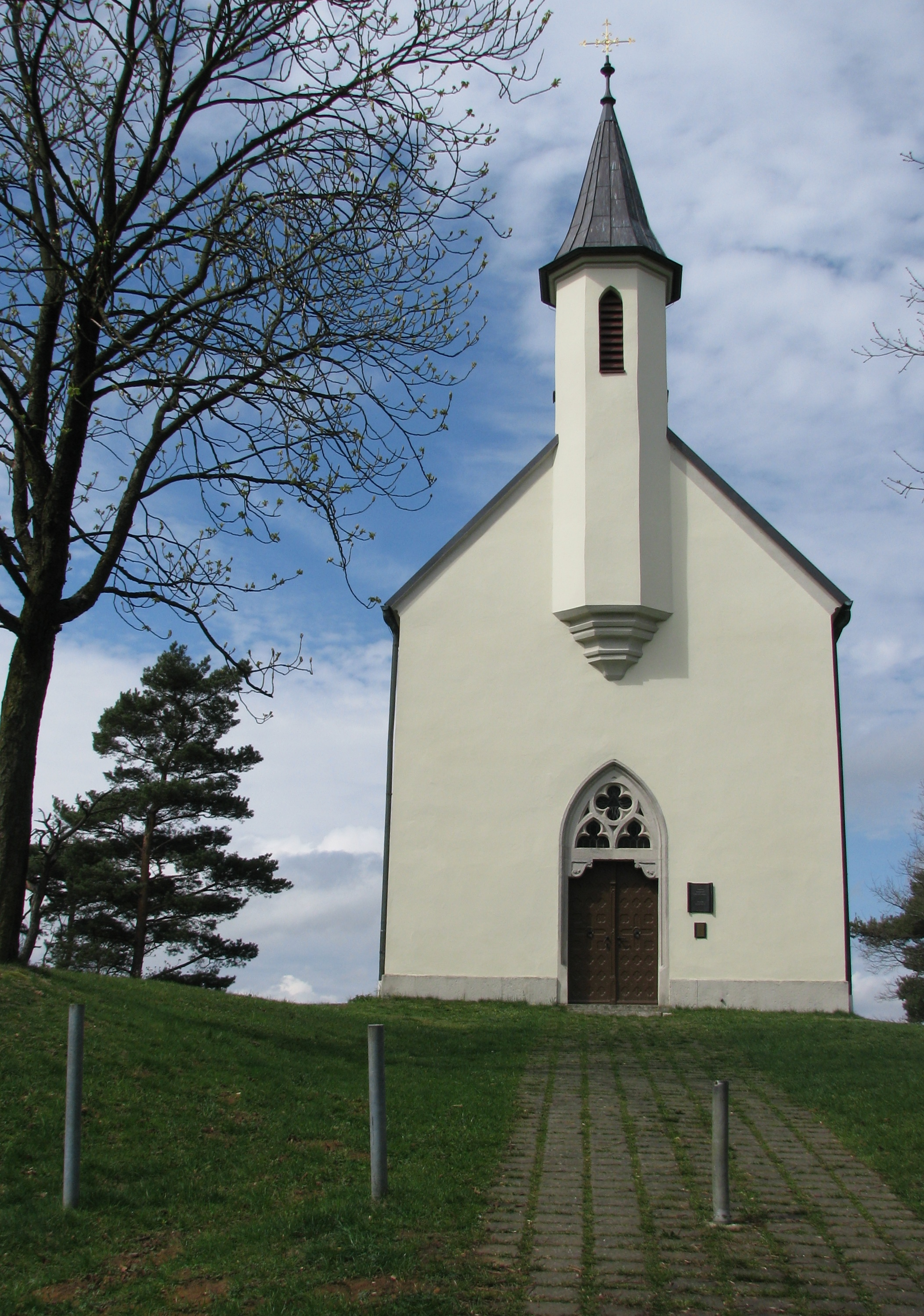 Möningerberg bei Möning, Ortsteil von Freystadt im Landkreis Neumarkt in der Oberpfalz, 14-Nothelfer-Kapelle von 1884